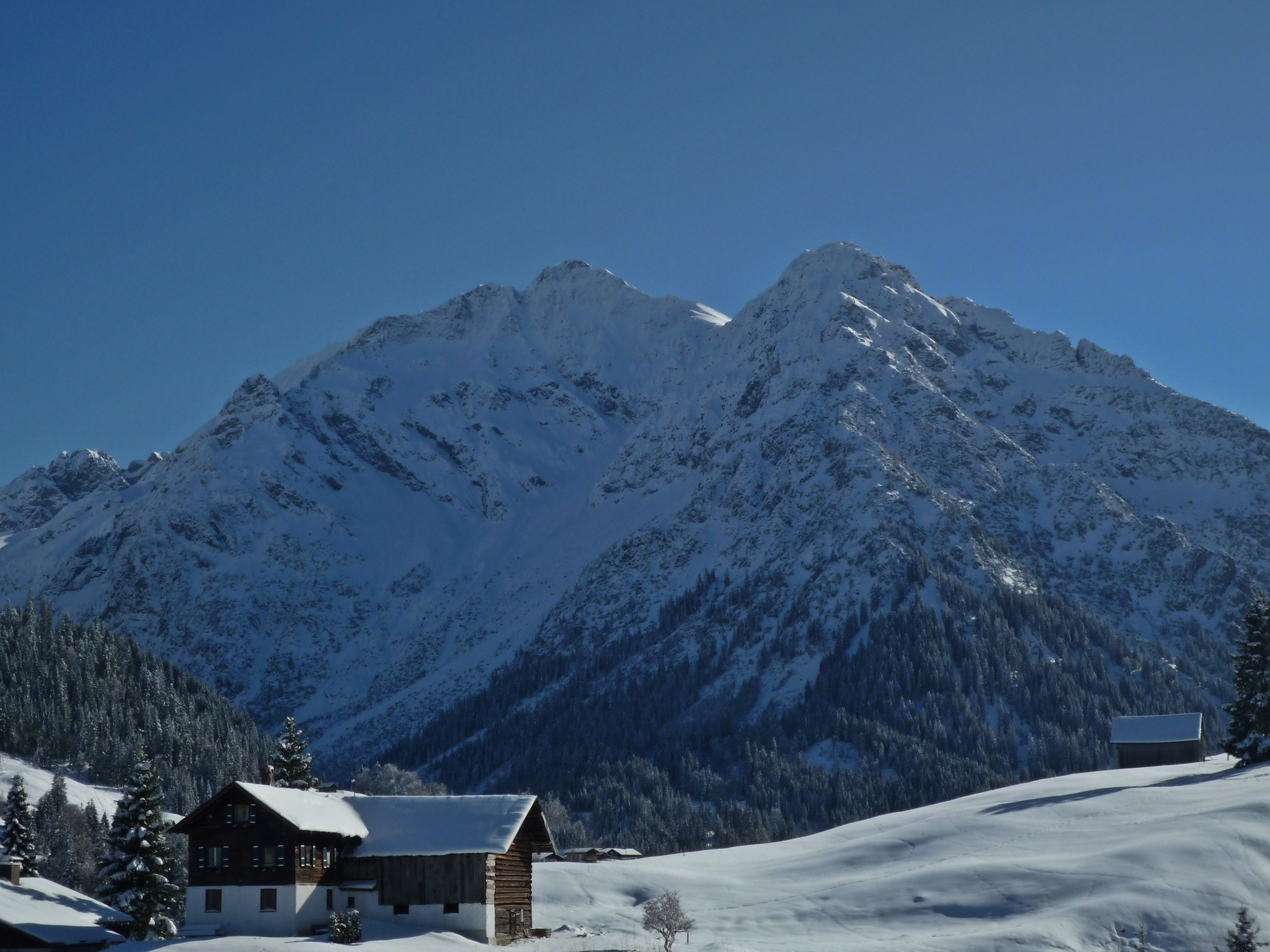 Blick von Hirschegg nach Süden auf Elferkopf (2387 m) und Zwölferkopf (2224 m).